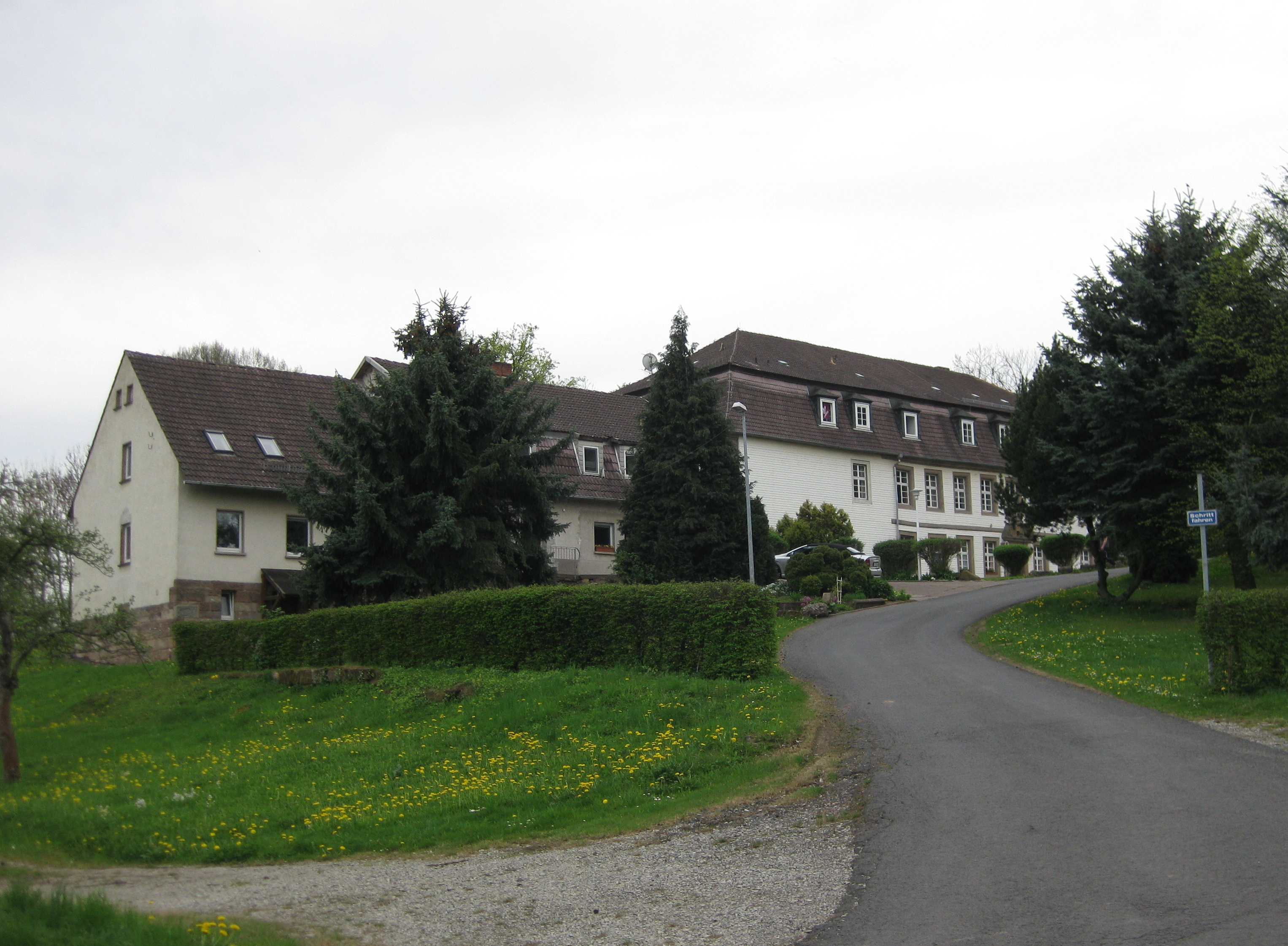 Schloss Rusteberg (Eichsfeld)